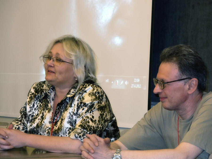 Konvencija Kontakt, koja je spojila 34. SFeraKon i 34. Eurocon u Zagrebu